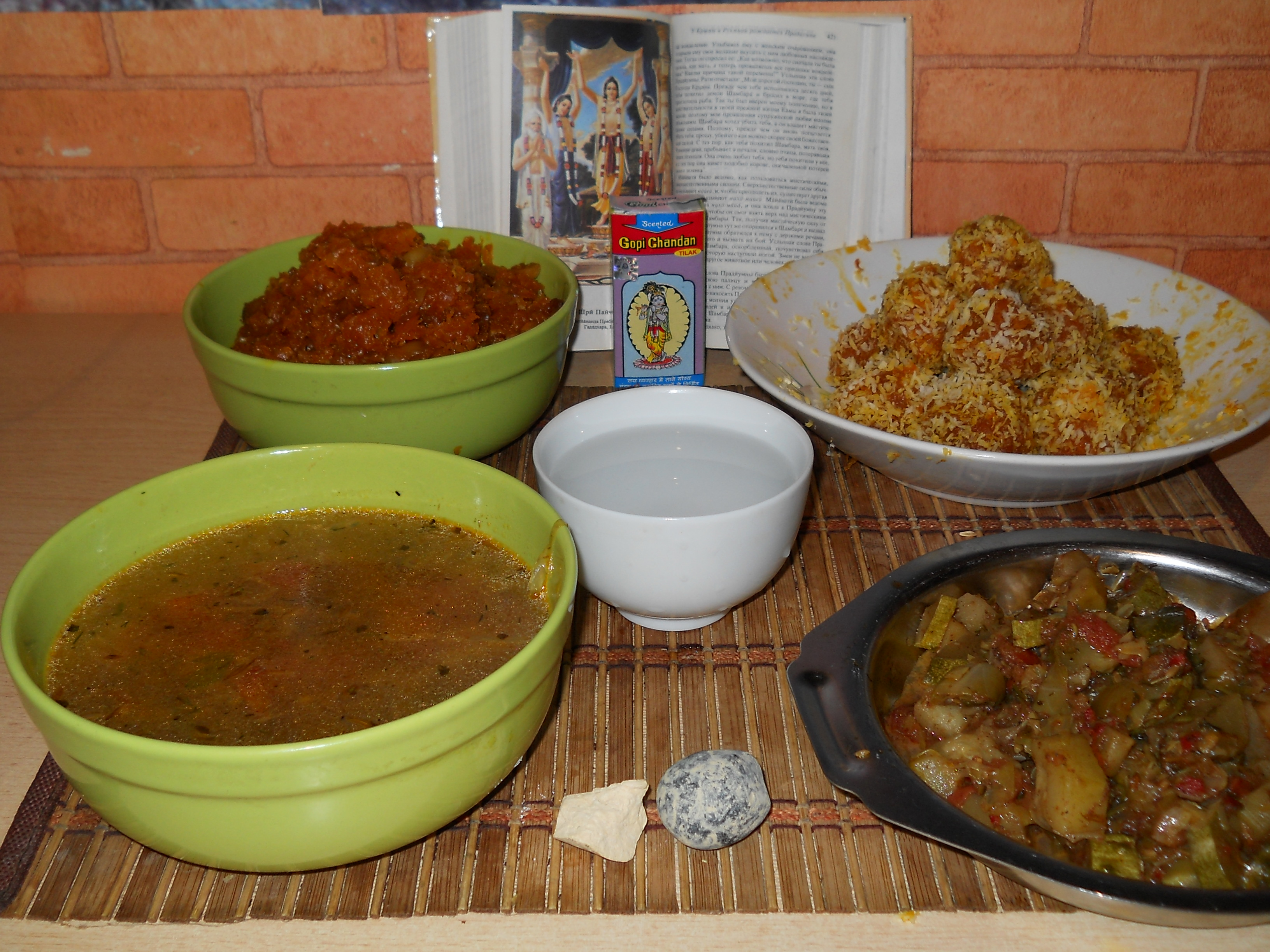 суп,сабжи,халва-морковная-шарики в кокосовой стружке